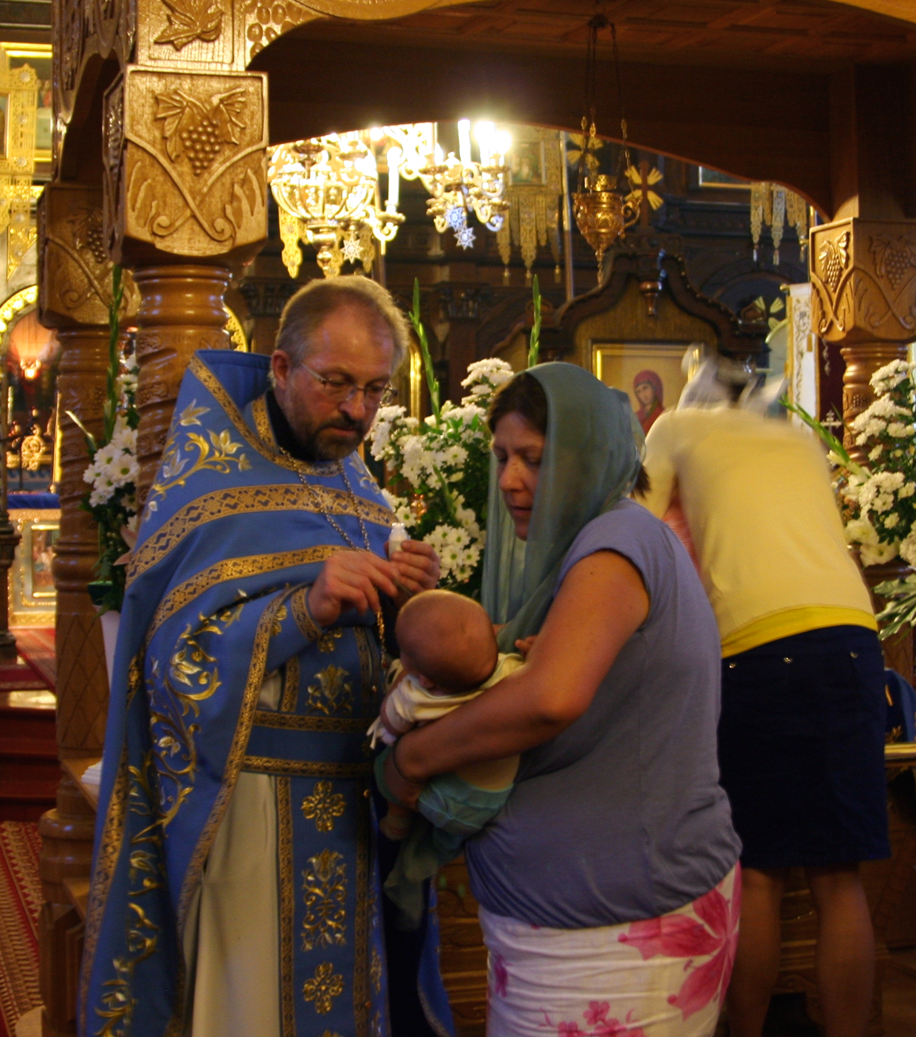 Święto Zaśnięcia Bogurodzicy w cerkwi Zaśnięcia NMP w Dubinach.